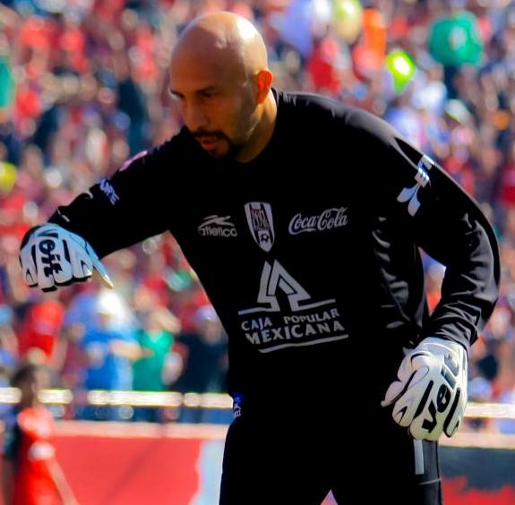 xolos vs san luis para la jornada 16 del apertura 2011 del futbol mexicano partido celebrado en el estadio caliente de Tijuana